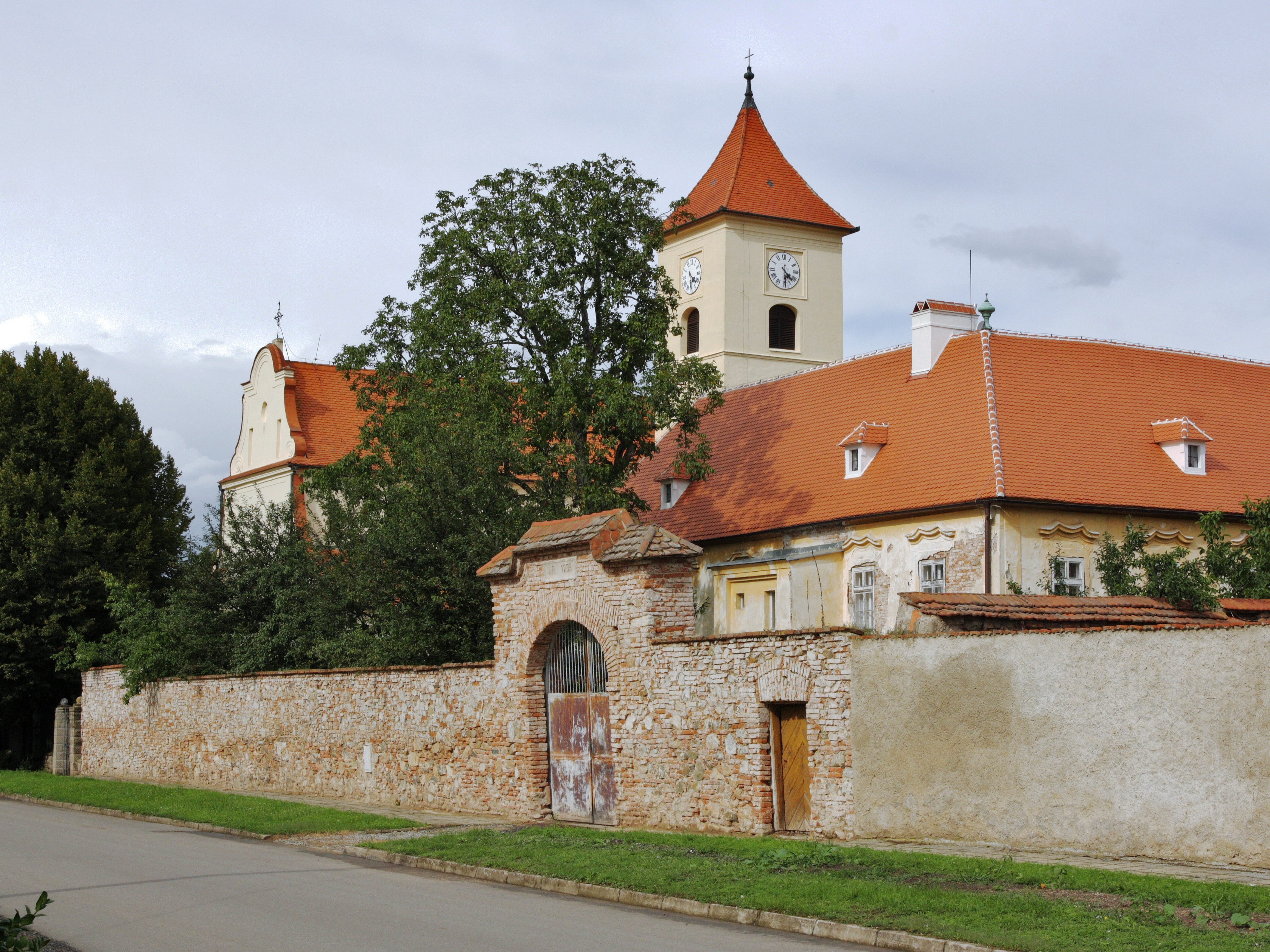 Loděnice (okres Brno-venkov) - kostel a fara.